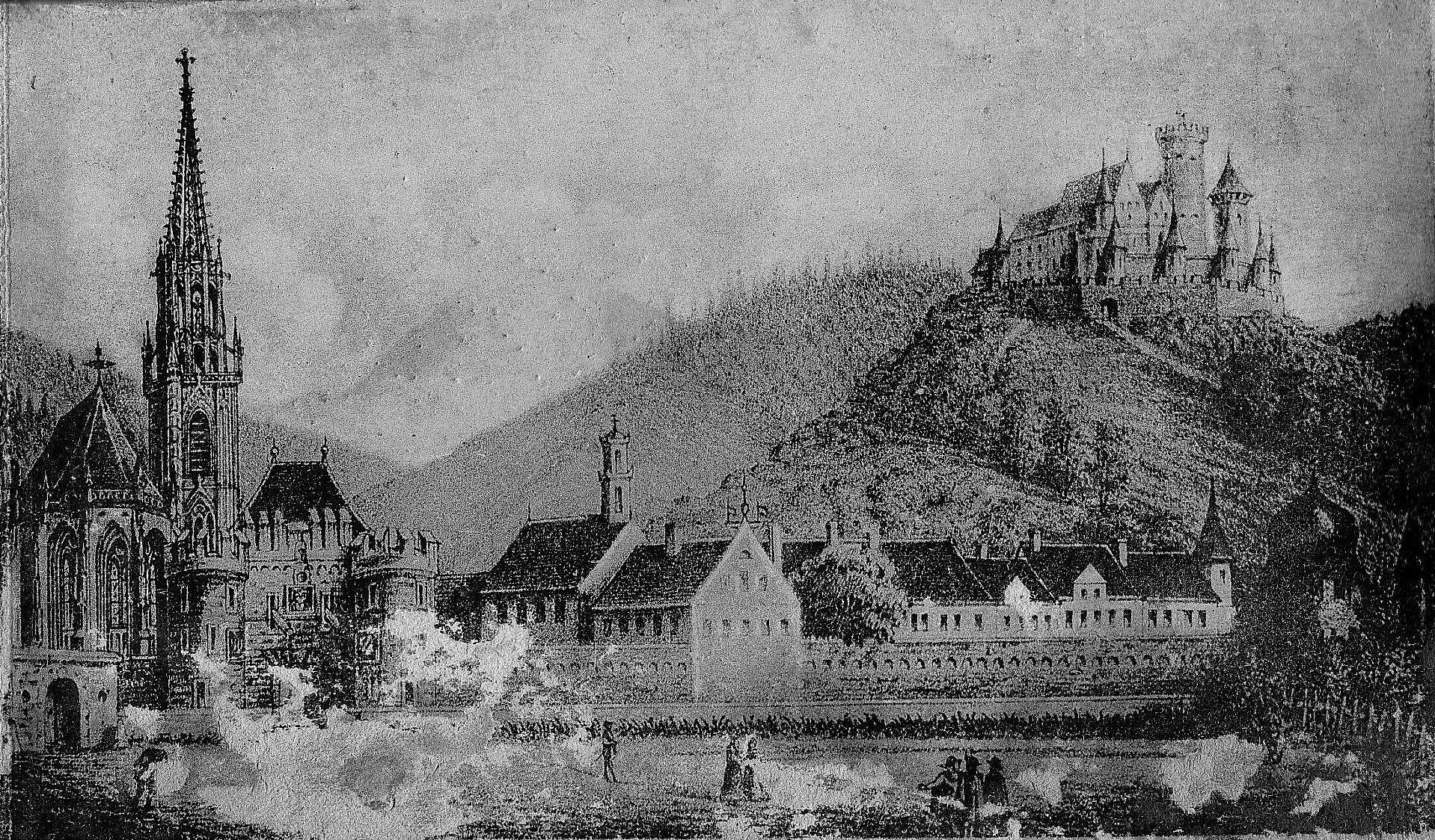 Vue de Thann (Haut-Rhin, France) en 1600.